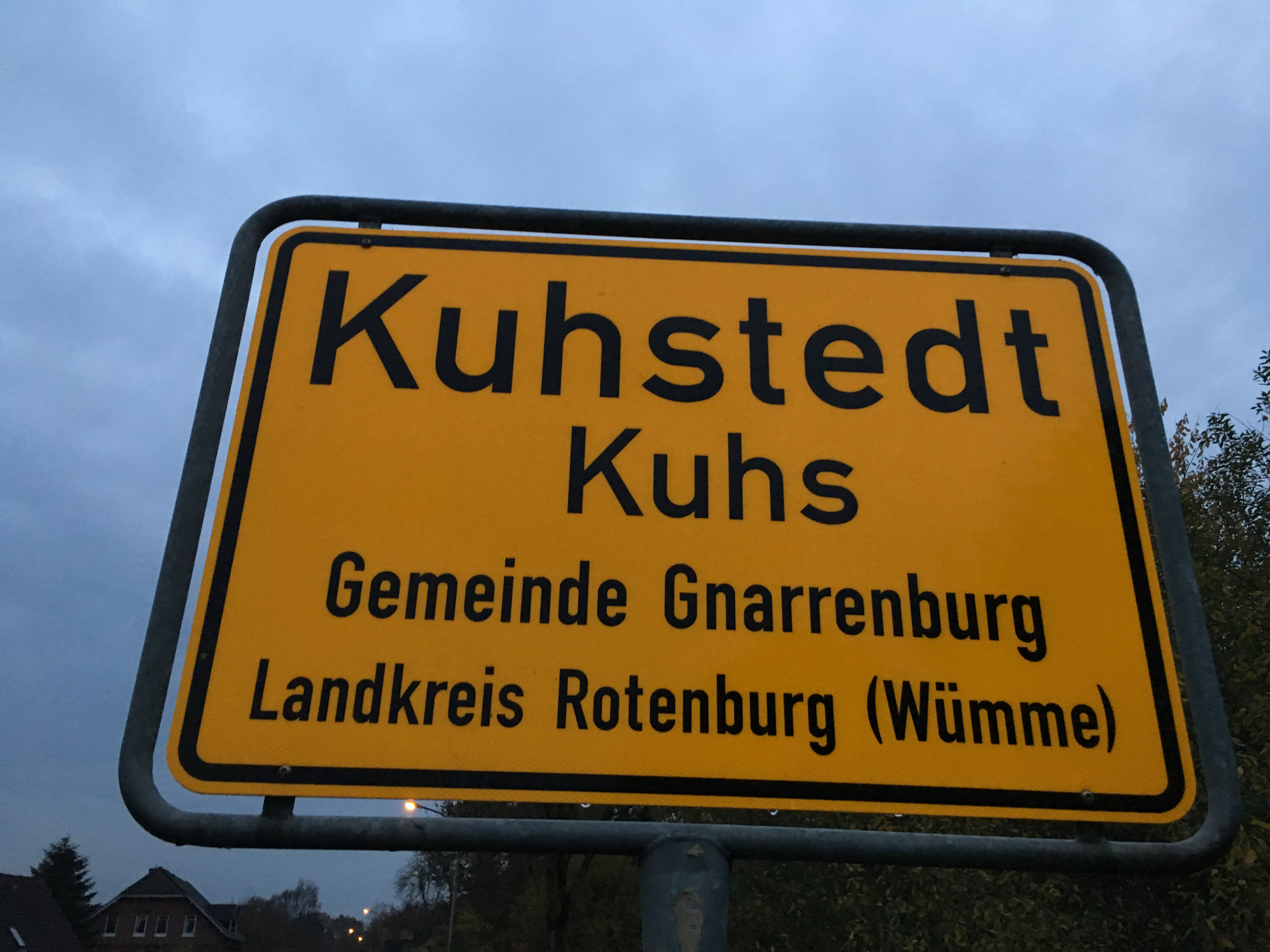 Oortsschild von Kuhs, Landkreis Rodenborg, mit den Naam op Hoochdüütsch un op Plattdüütsch